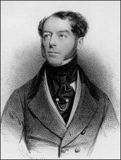 Georges de Baillet-Latour (1802-1882), bourgmestre de Merlepont, député à la Chambre des représentants belge